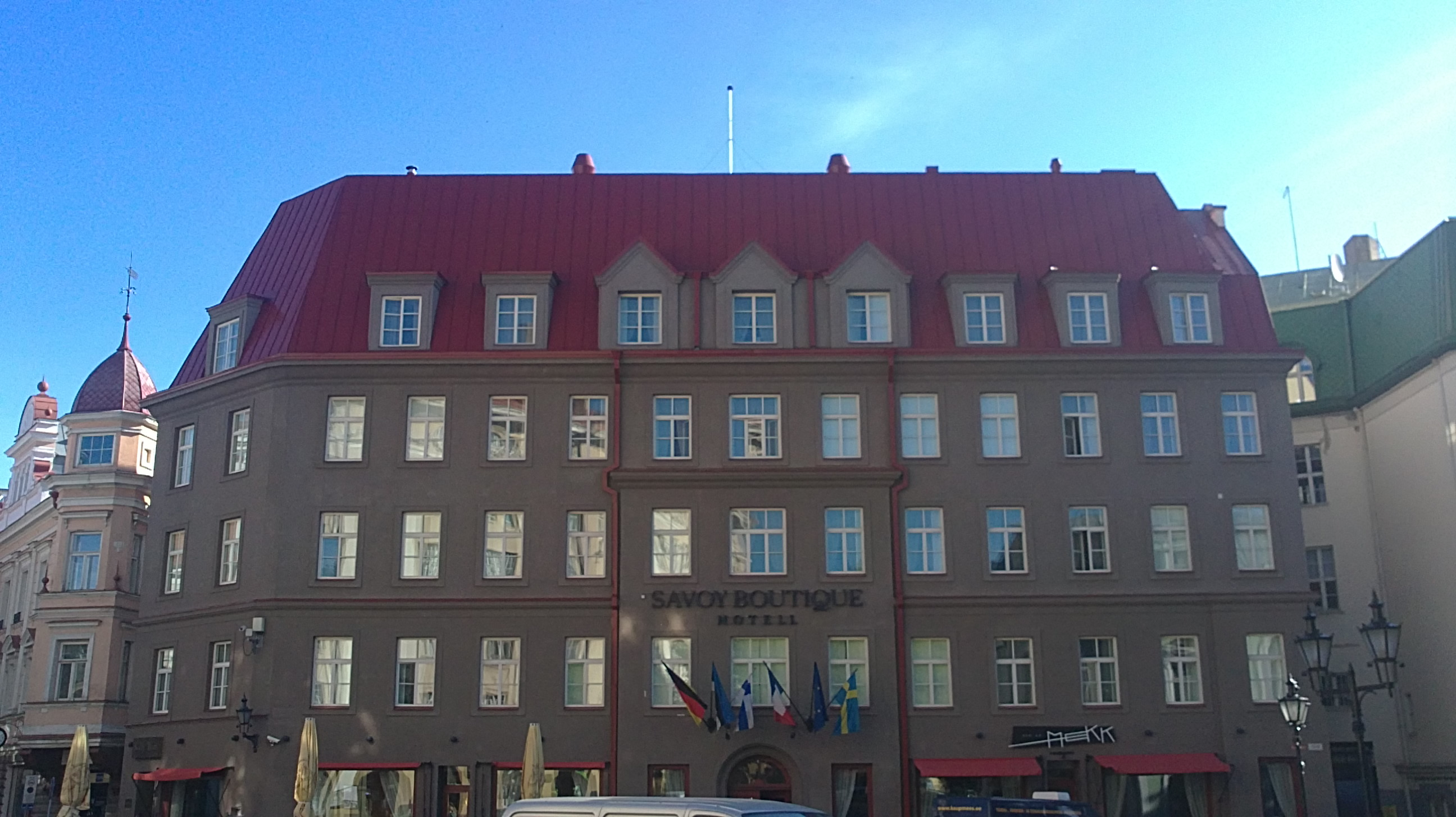 Hoone Tallinna vanalinnas Suur-Karja tänav 17/19, Karjavärava väljakul